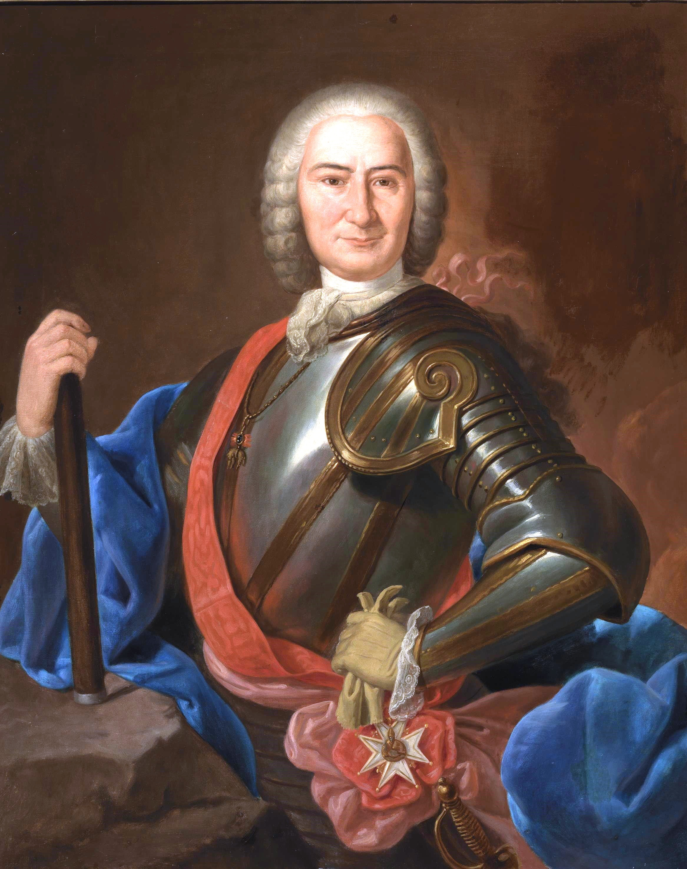 Retrato del aristócrata y militar español José Carrillo de Albornoz (1671-1747), conde y posteriormente primer duque de Montemar.